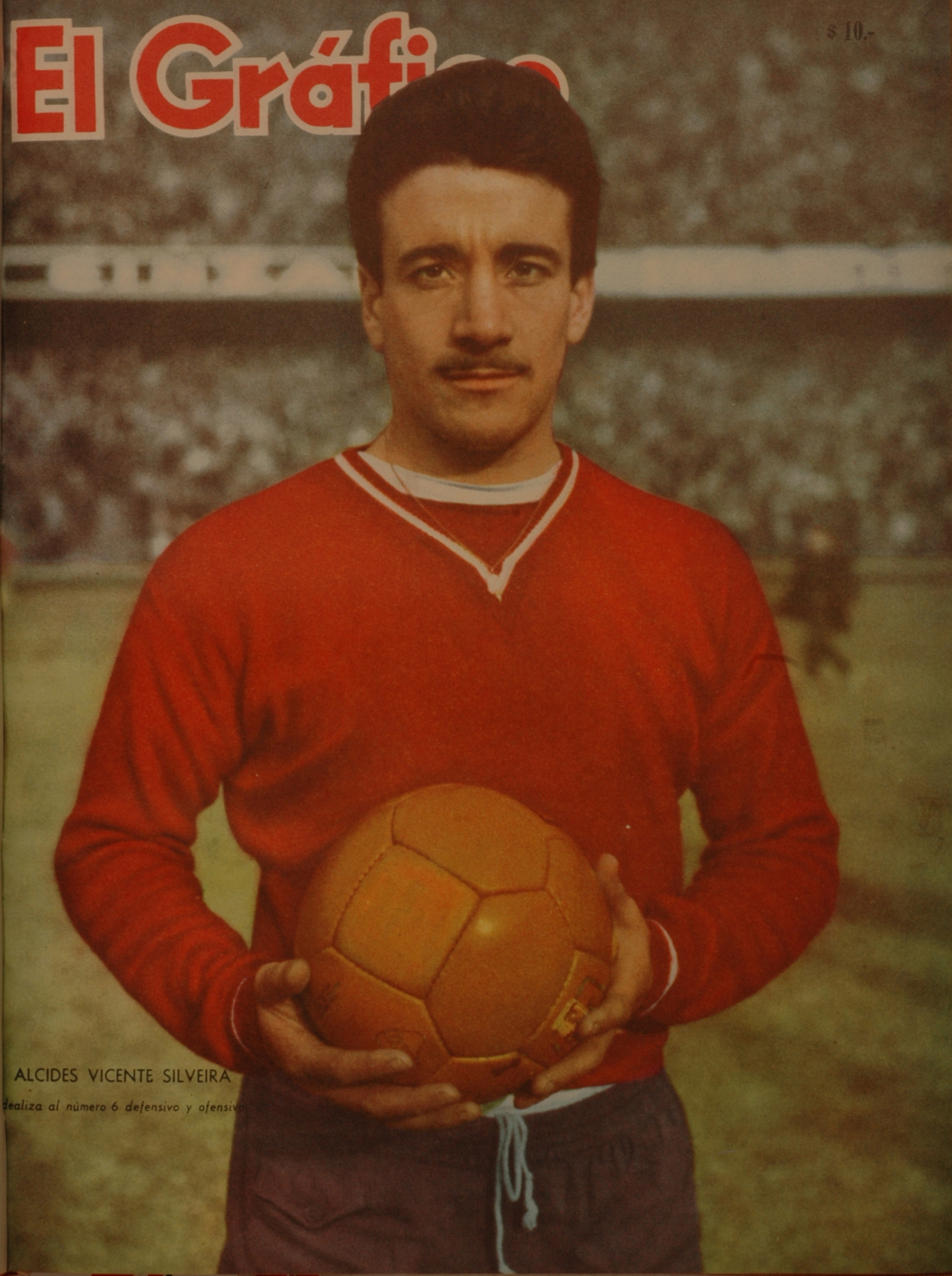 El Grafico del 14 de Septiembre de 1960. Edicion 2138